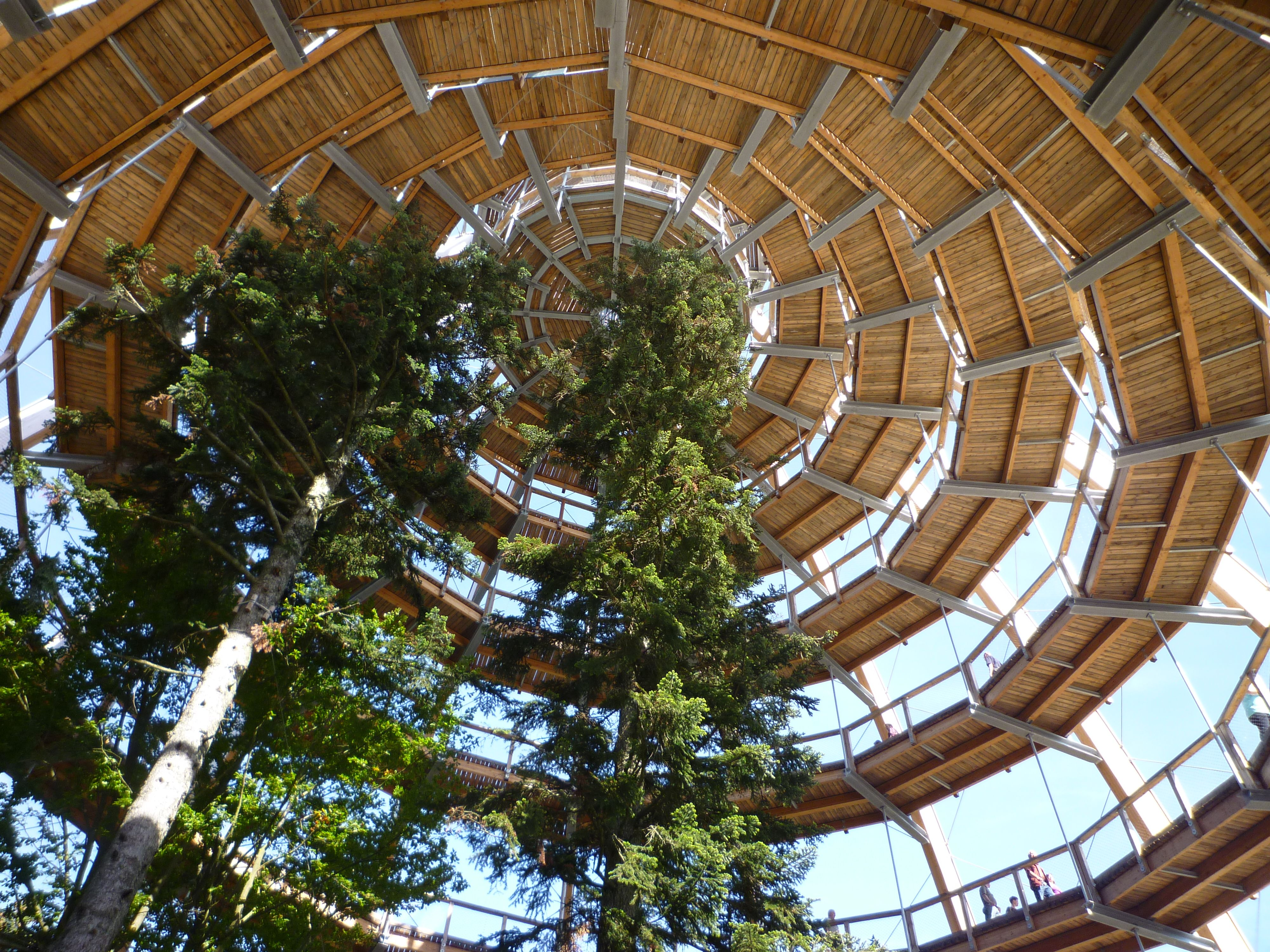 Neuschönau - Baumturm_02